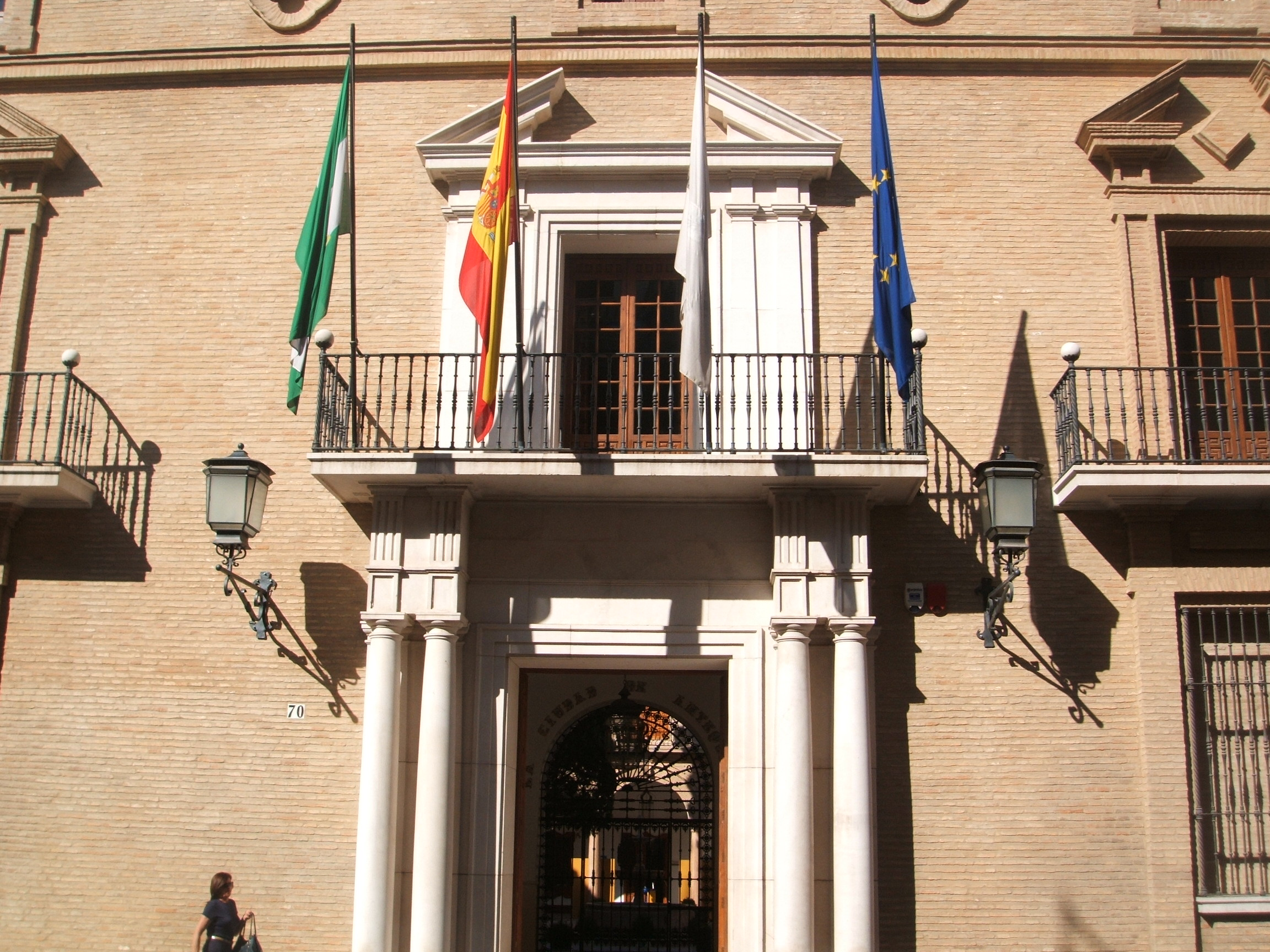 Ayuntamiento